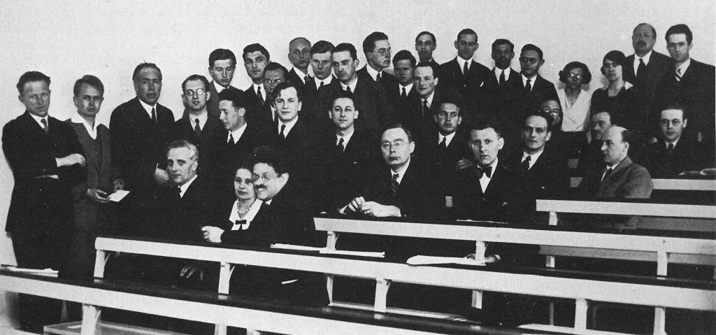 Copenhagen, spring 1932. People on the picture from left to right: Heisenberg, Werner Karl; Hein, Piet; Bohr, N.; Brillouin, Leon Nicolas; Rosenfeld, Leon; Delbrück, Max; Heitler, Walter; Meitner, Lise; Ehrenfest, Paul; Bloch, Felix; Waller, Ivar; Solomon, Jacques; Fues, Erwin; Strømgren, Bengt; Kronig, Ralph de Laer; Gjelsvik, A; Steensholt, Gunnar; Kramers, Hendrik Anton; Weizsäcker, Carl Friedrich von; Ambrosen, J.P.; Beck, Guido; Nielsen, Harald Herborg; Buch-Andersen; Kalckar, Fritz; Nielsen, Jens Rud; Fowler, Ralph Howard; Hyllerås, Egil Andersen; Lam, Ingeborg; Rindal, Eva; Dirac, Paul Adrian Maurice; N.N.; Darwin, Charles Galton; Manneback, Charles; Lund, Gelius